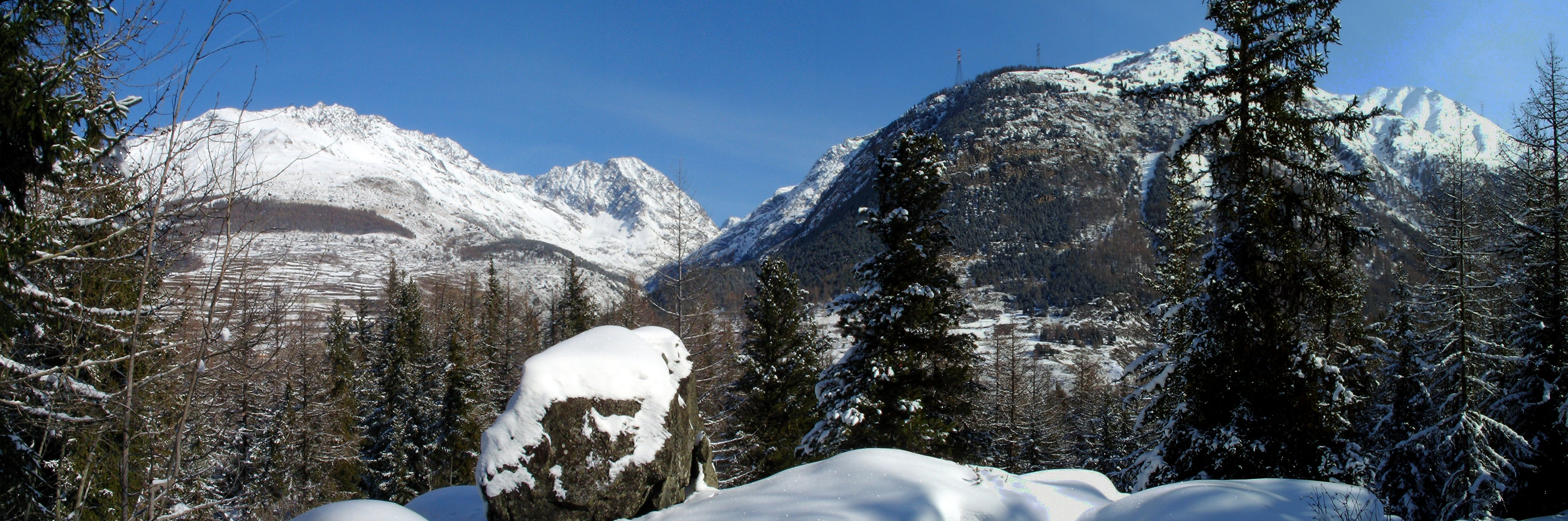 Un bosco presso Cogne nel periodo invernale